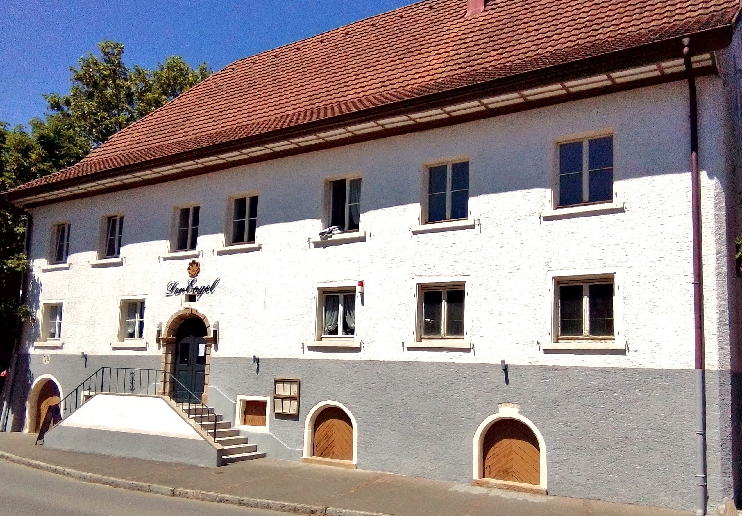 Gasthaus Der Engel in Rheinheim, Ortsteil der Gemeinde Küssaberg im Landkreis Waldshut in Baden-Württemberg. Straßenseite mit Eingangsbereich.